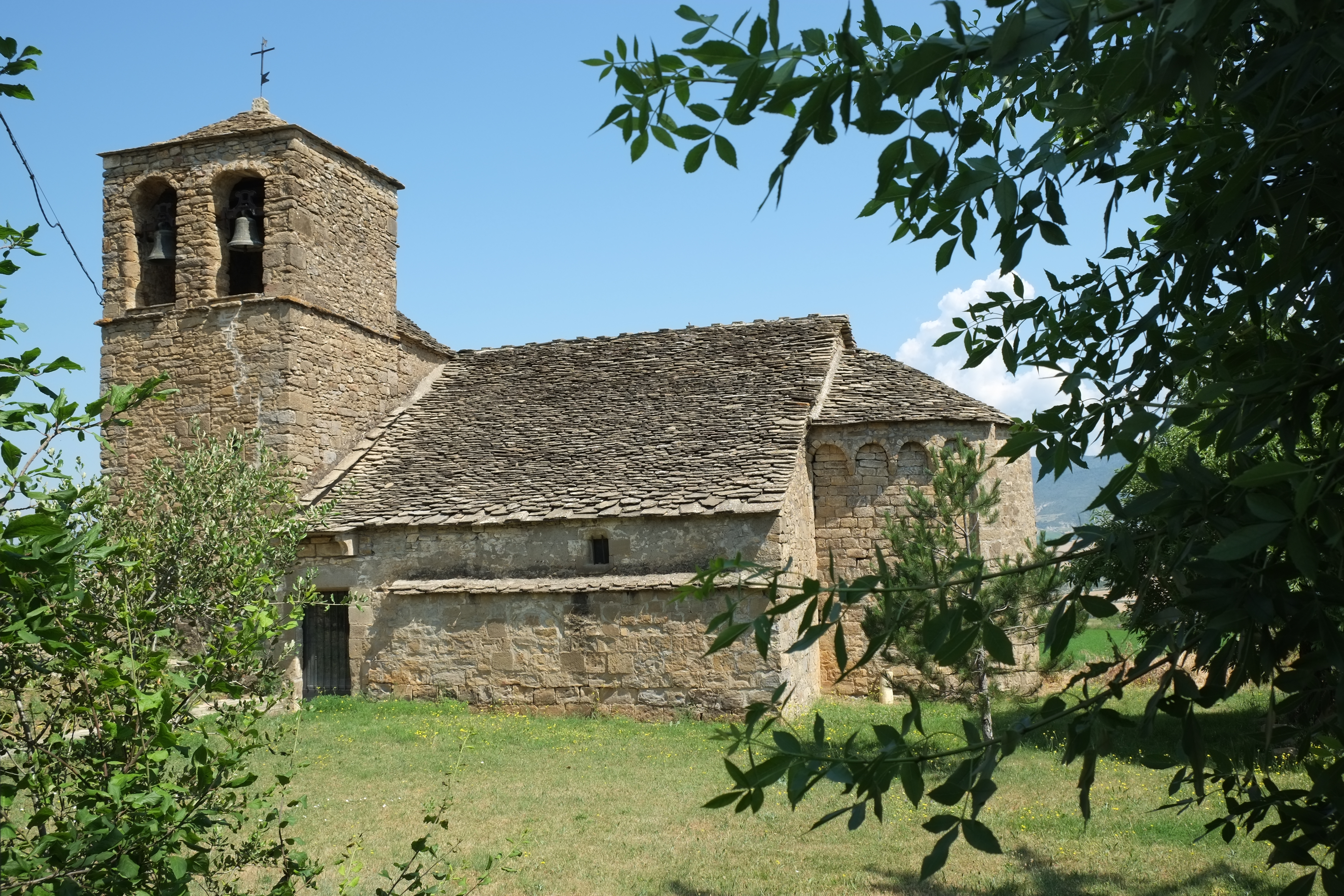 Kirche Los Santos Ángeles Custodios in Binacua in der spanischen Provinz Huesca (Aragonien/Spanien)